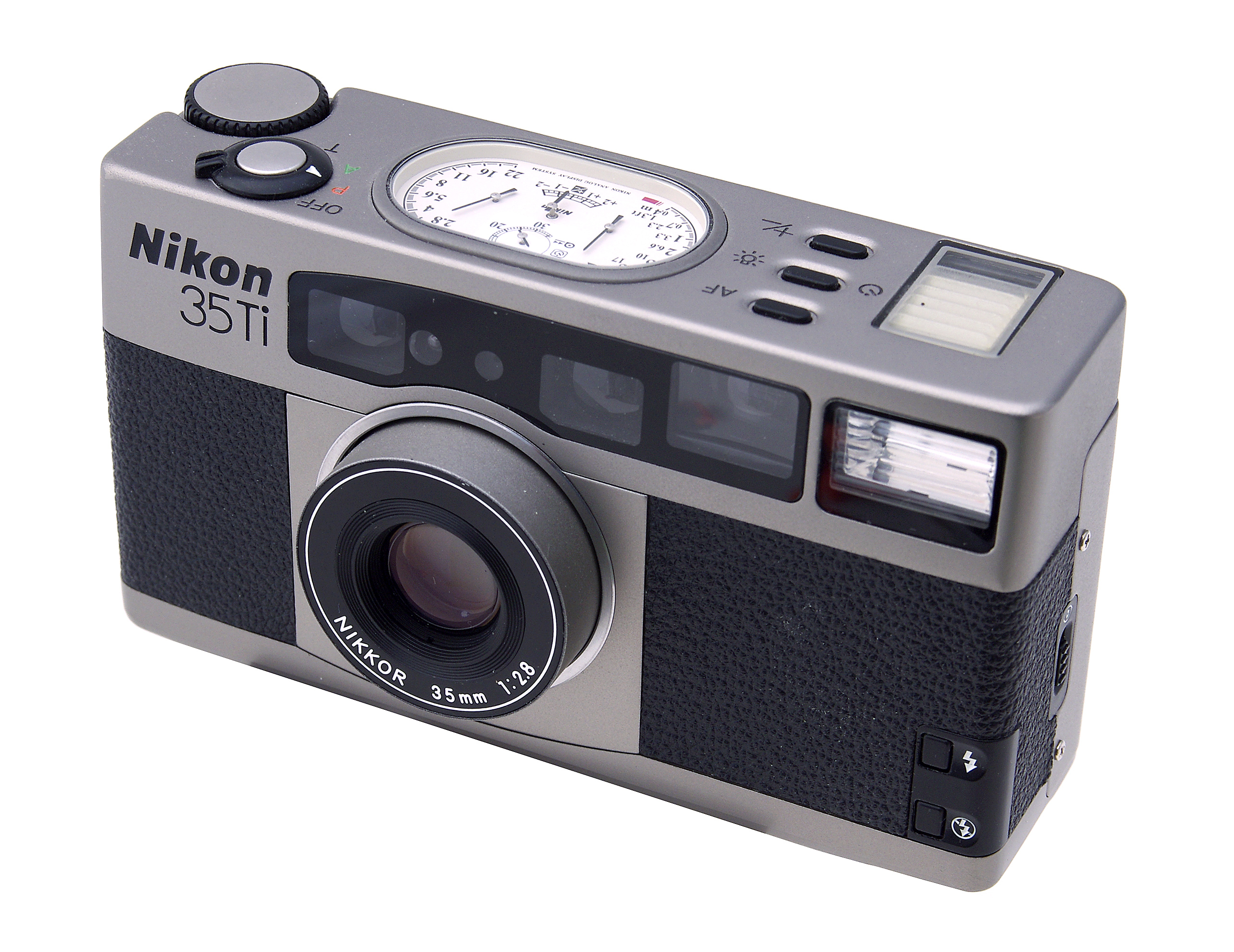 Nikon 35Ti